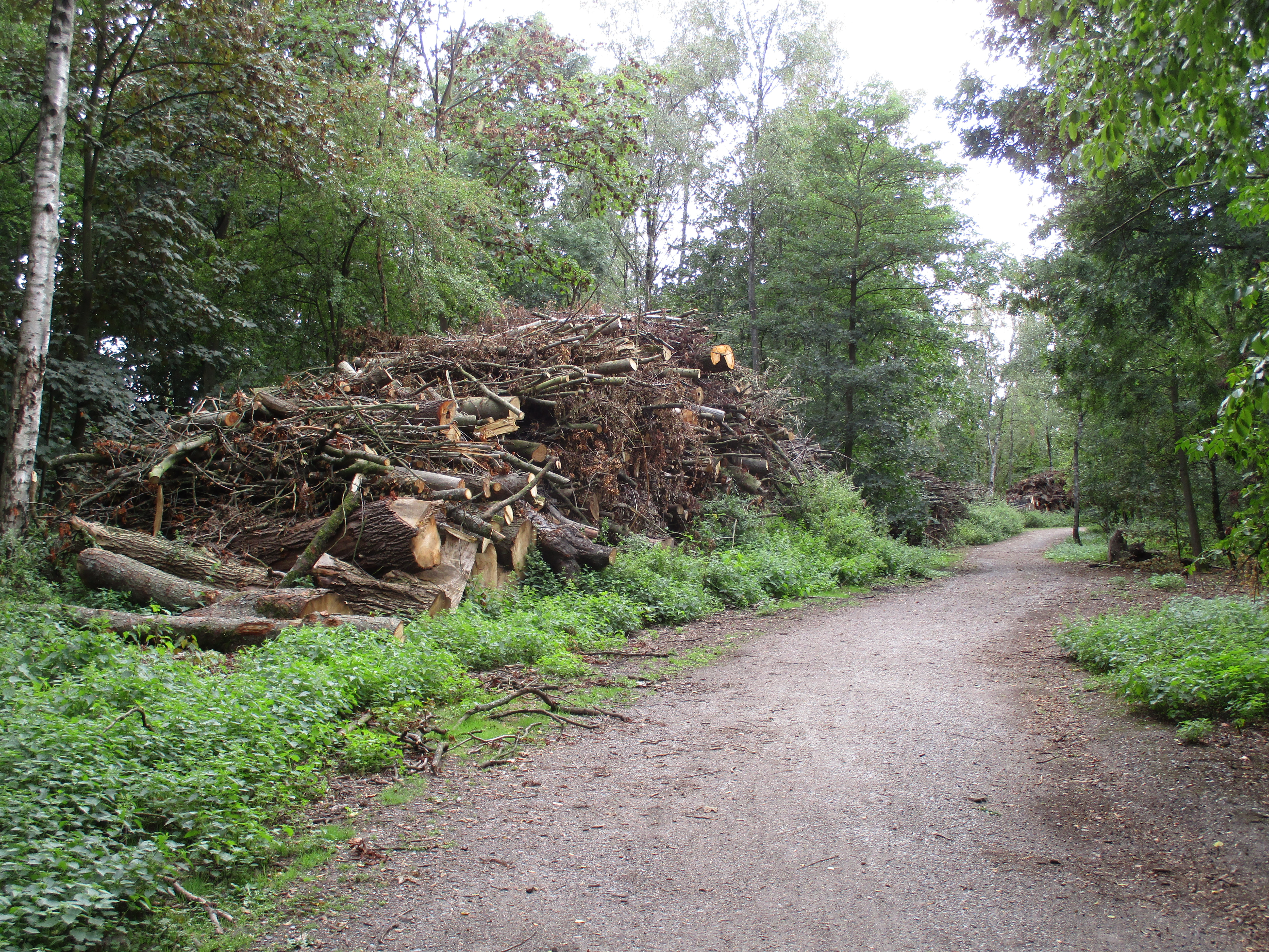 Panzerbau III war eine Rüstungsschmiede der Firma Krupp während dem 2. Weltkrieg in Essen-Borbeck. Dort wurden Zulieferteile für den Tigerpanzer gefertigt. Heute befindet sich auf der Fläche ein kleines Naherholungsgebiet. Hier und da entdeckt man heute noch Fundamentreste der ehemaligen Panzerfabrik.